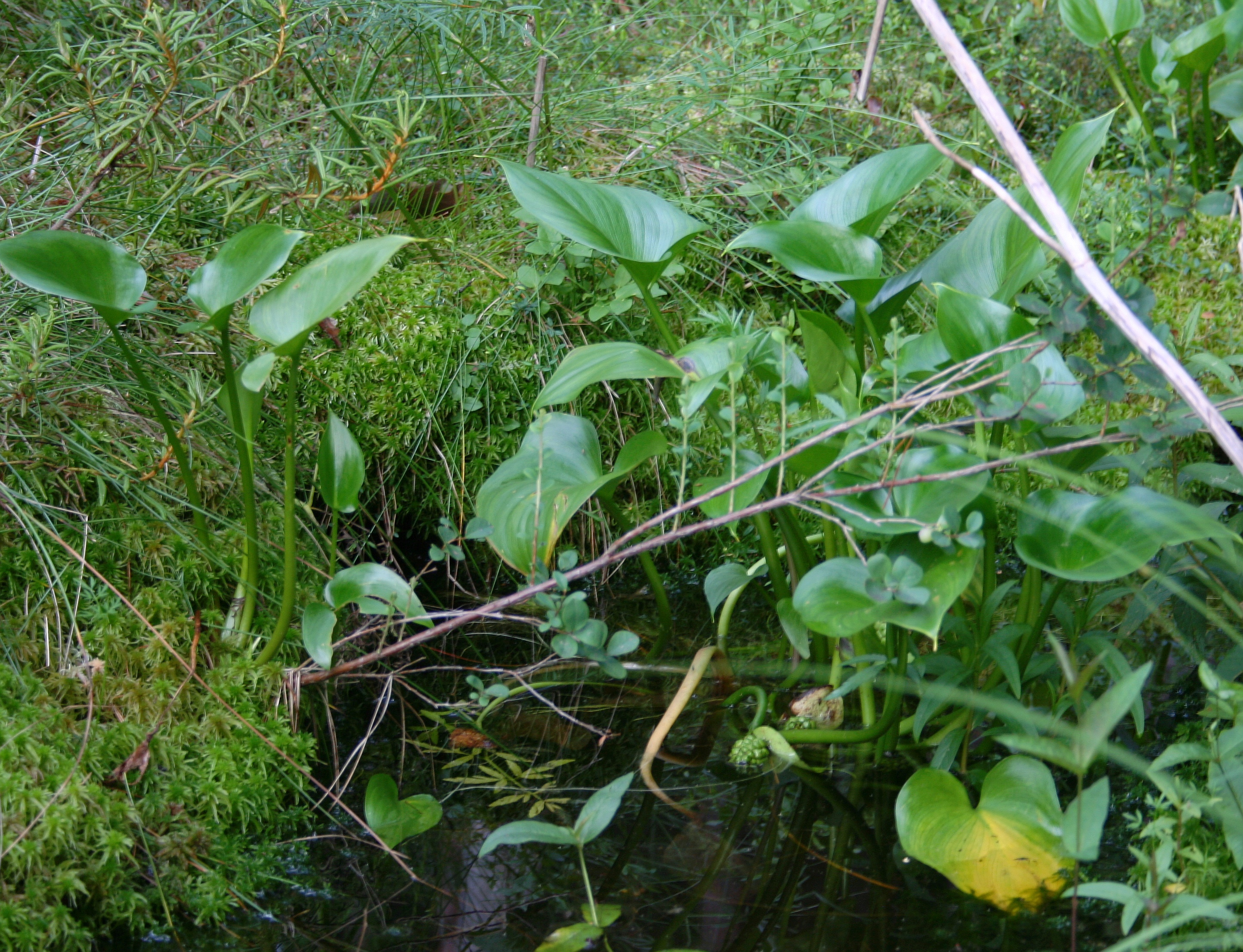 Czermień błotna, Wigierski Park Narodowy.